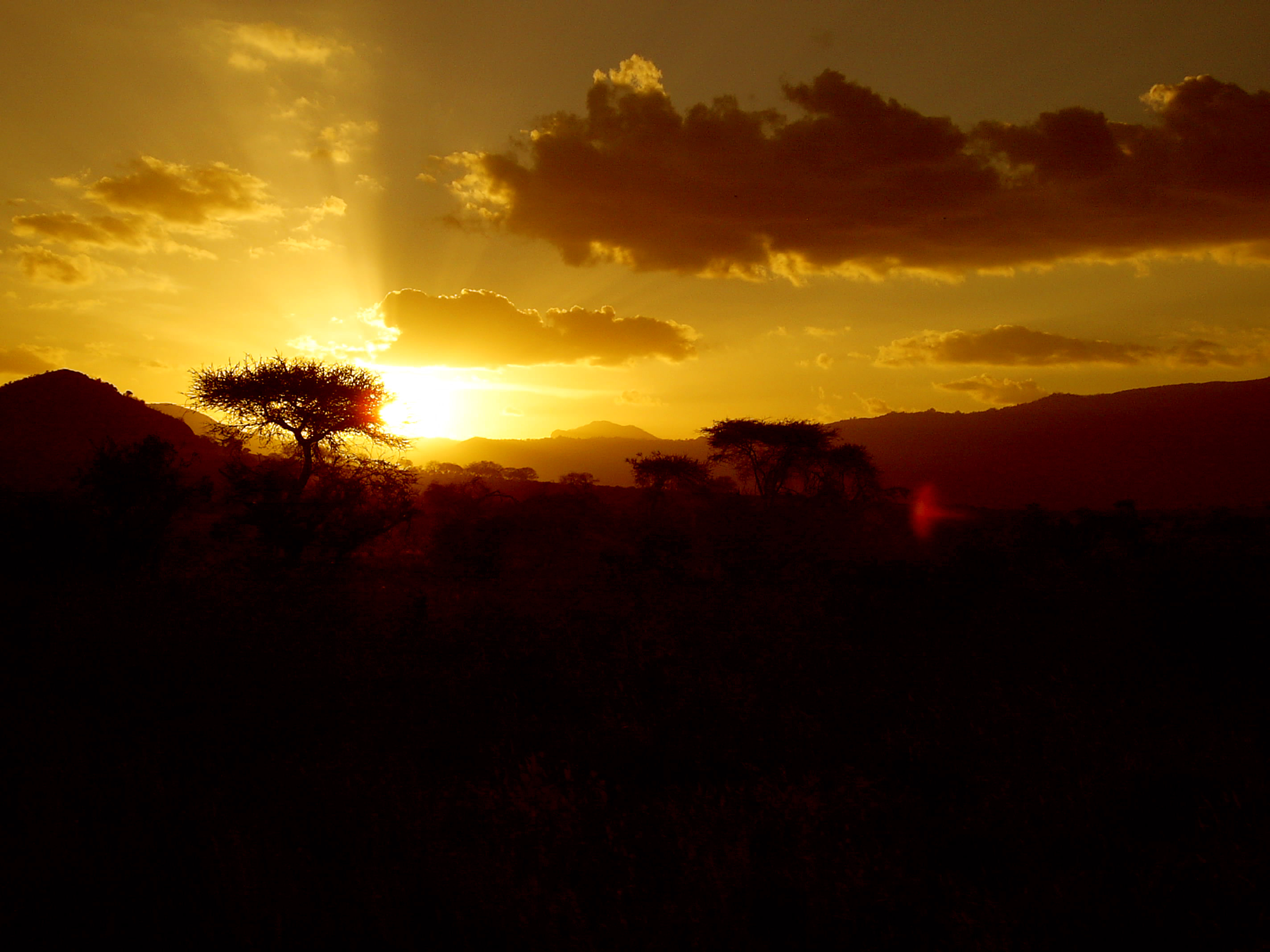 Sonnenuntergang im Tsavo East Nationalpark